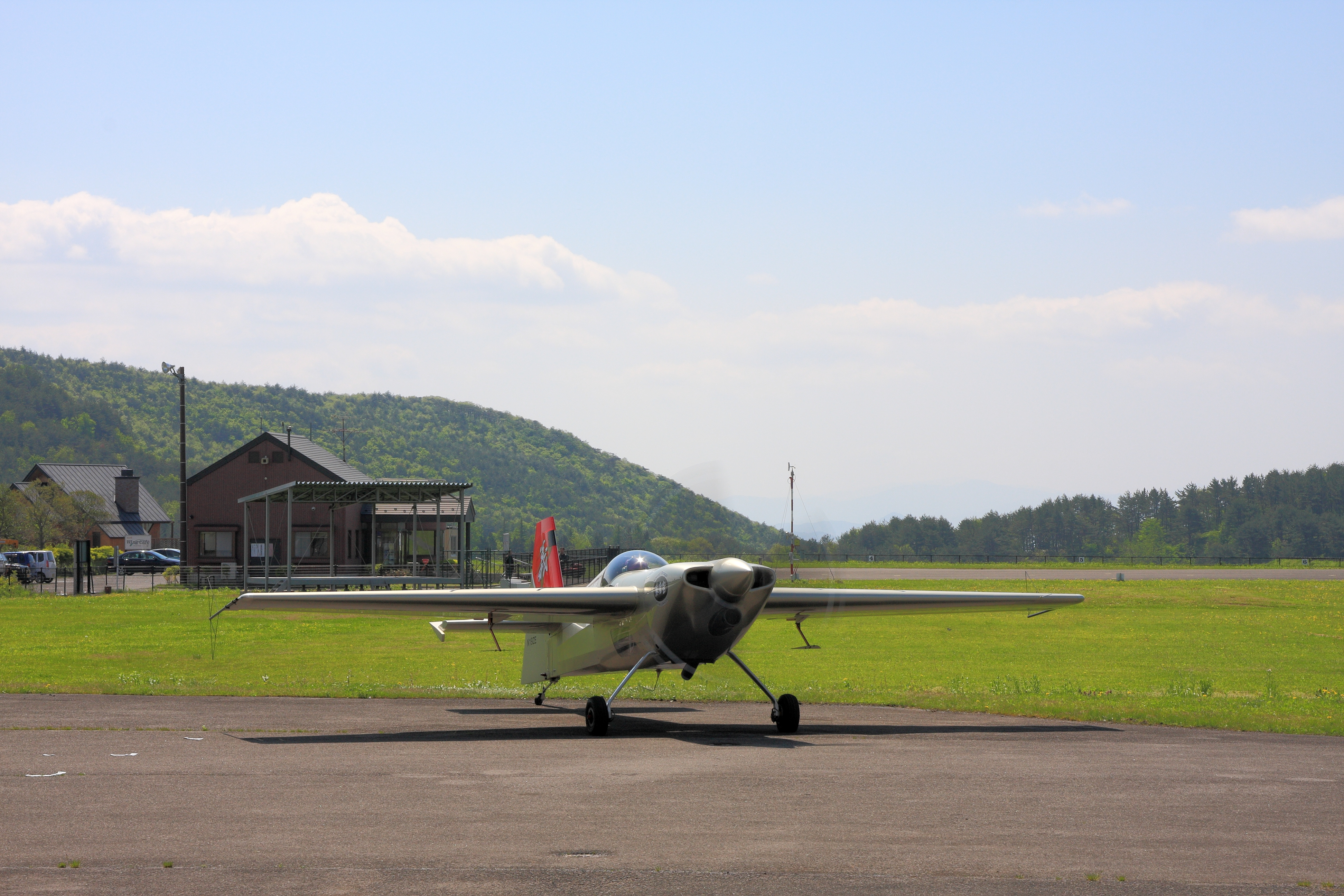 写真左手手前側の建物がふくしまスカイパークの管理棟